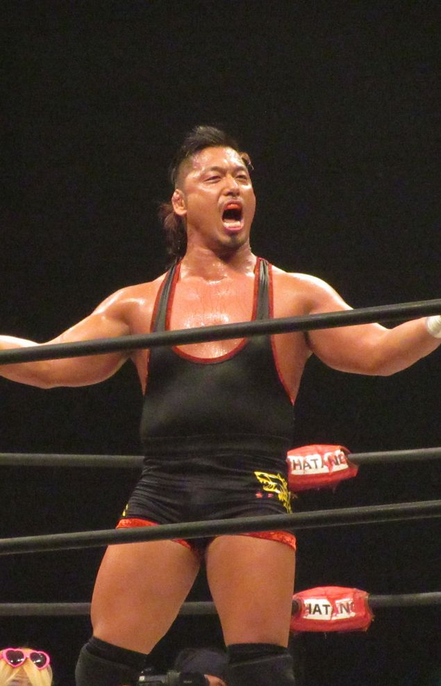 2017年11月3日